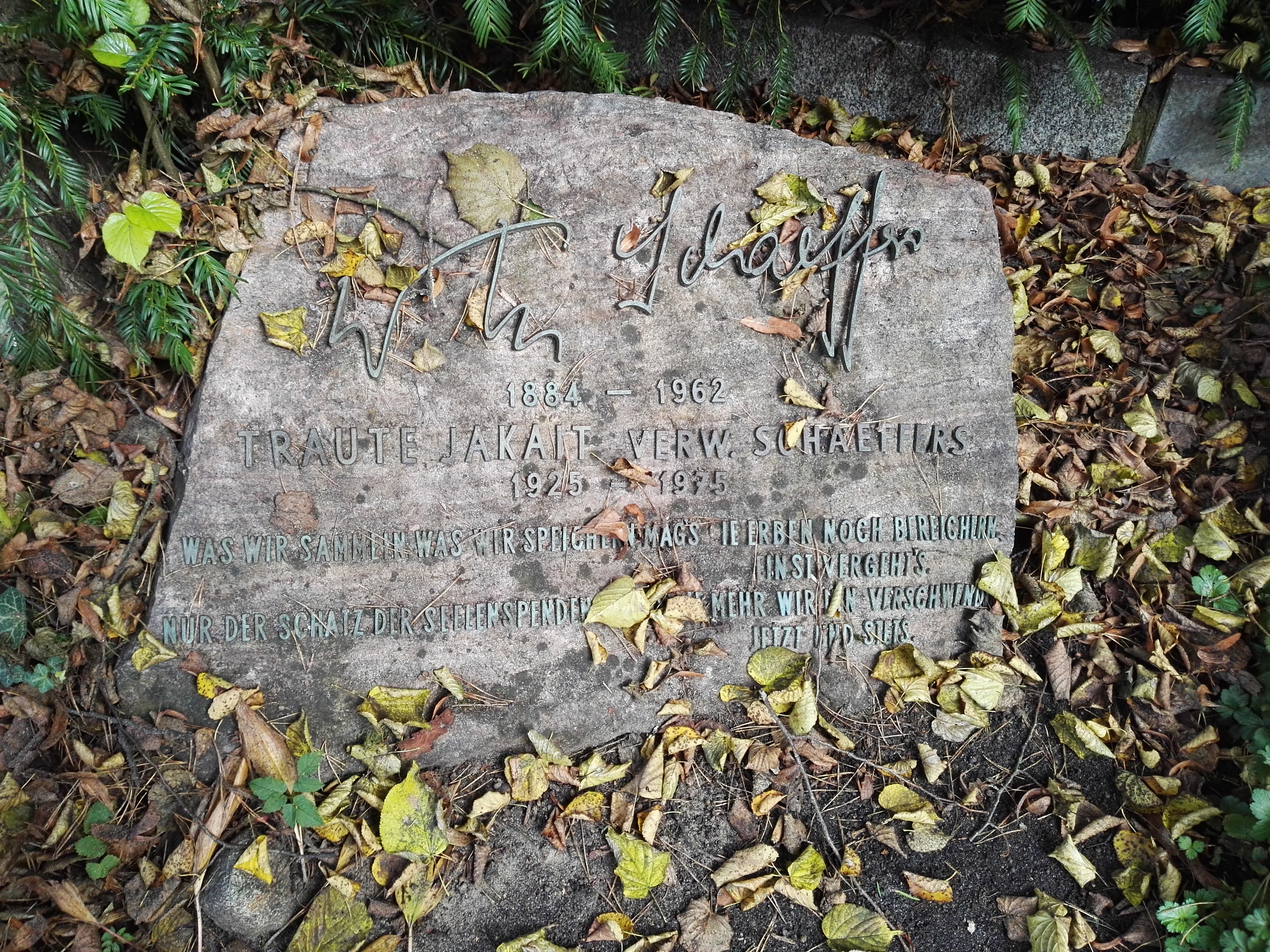 Grab von Willi Schaeffers Friedhof Heerstraße in Berlin; ehemaliges Ehrengrab